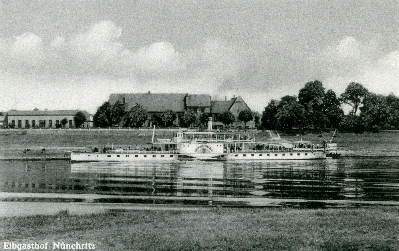 Nünchritz; Elbgasthof - Elbe mit Dampfer Mühlberg This postcard is from publisher Brück & Sohn in Meißen ( postcard has a unique number 28246 and is available in a higher resolution at the publisher. This images was uploaded in a cooperation project between Wikipedians and the publisher.